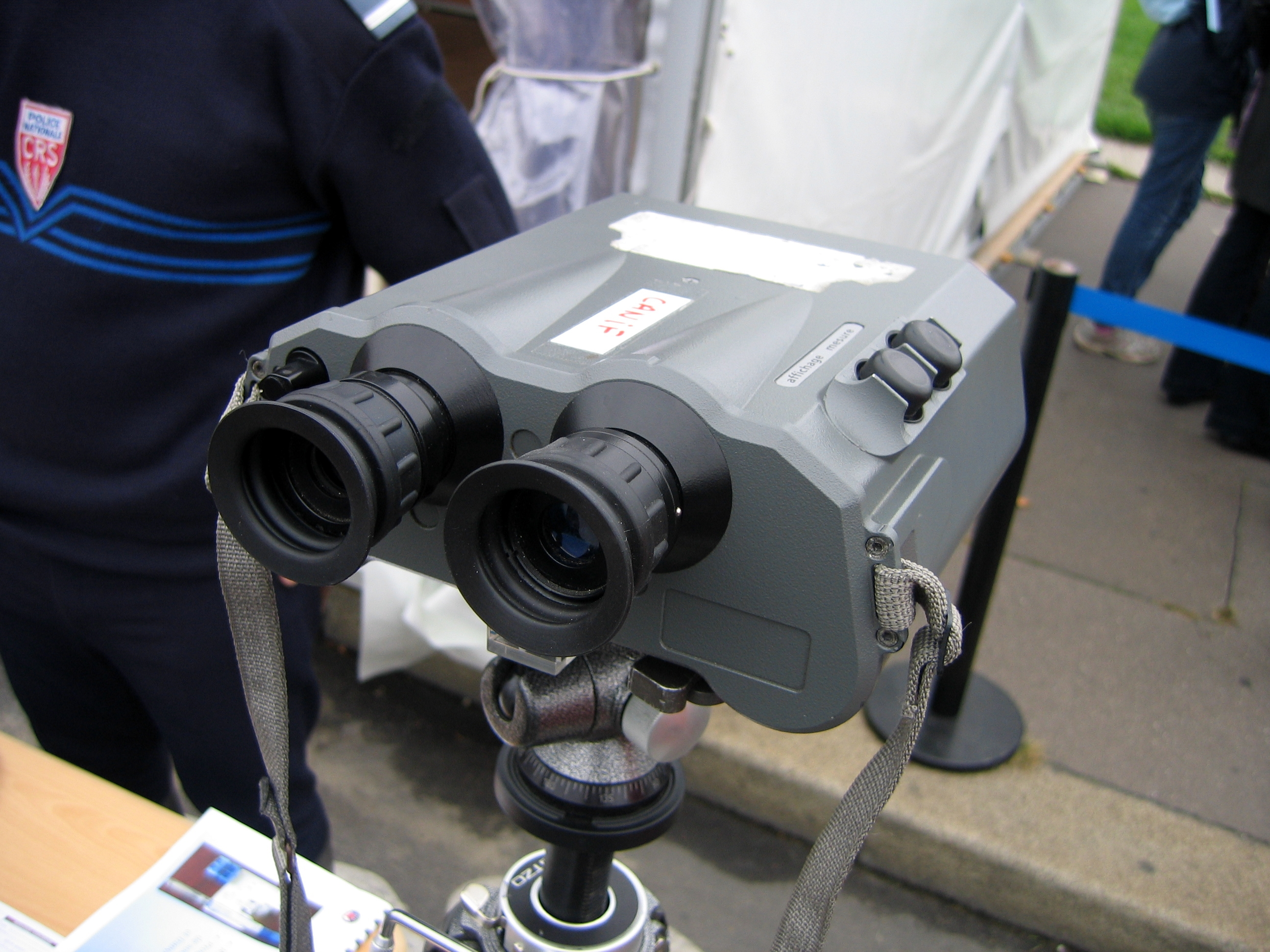 Radar eurolaser lors des journées de sécurité intérieures 2009 sur l'esplanade des Invalides.